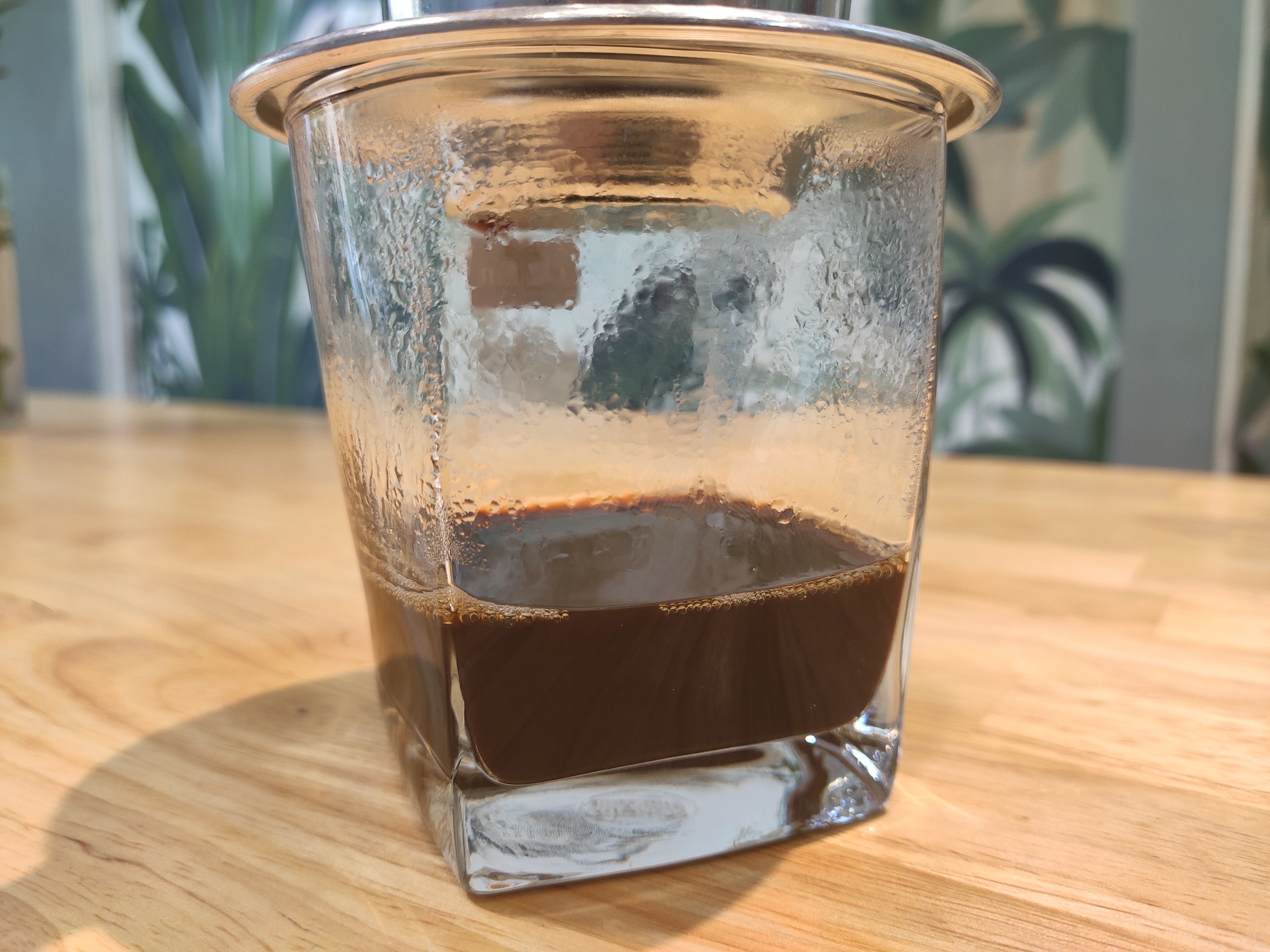 Cà phê nguyên chất có màu nâu, không phải màu đen đậm